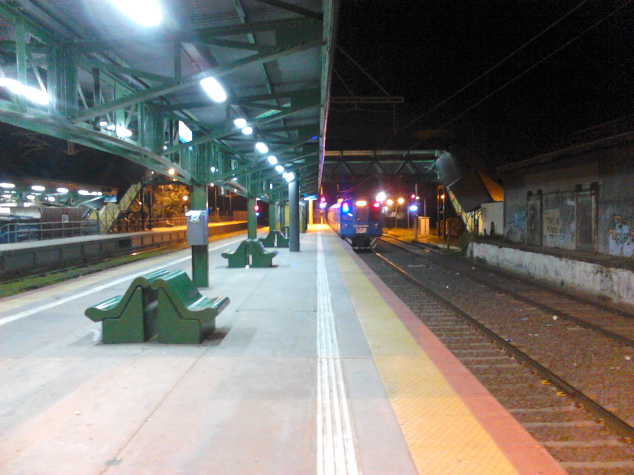 Vista de una formación partiendo desde la plataforma 3 hacia la estación de Guernica